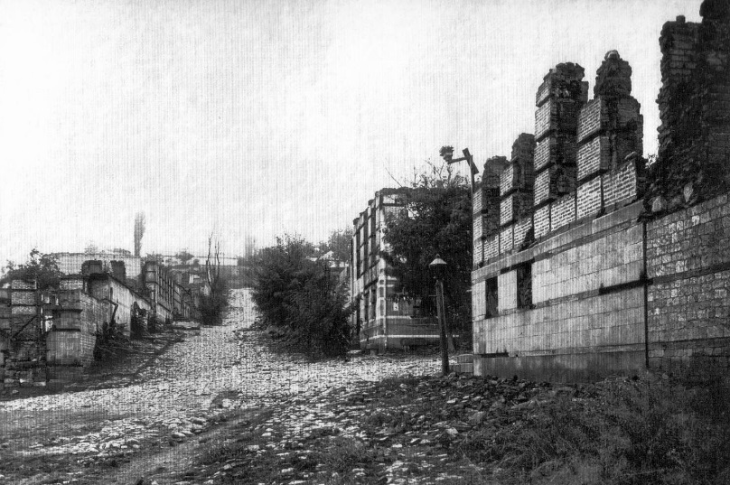 Pir Şirvan küçəsinin görünüşü